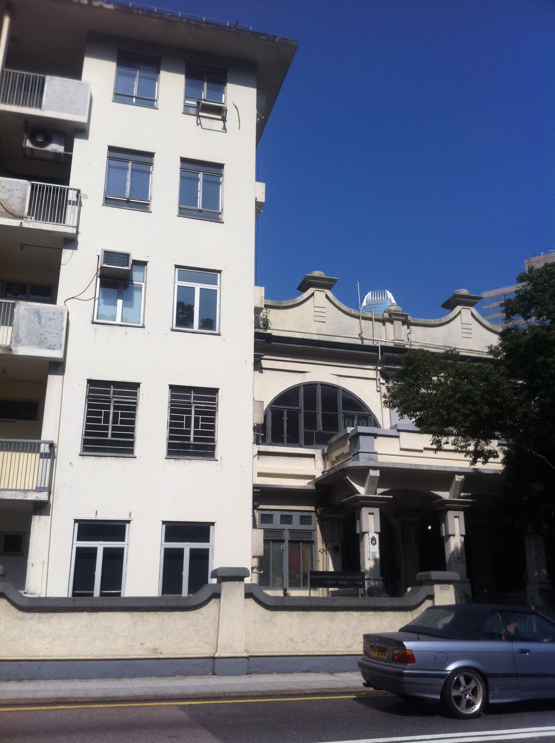 中文（香港）: 香港島 半山區 上亞厘畢道 住宅